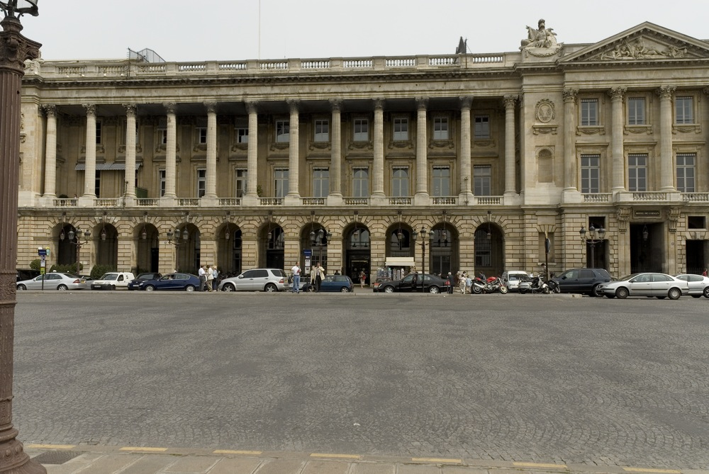 Façade de l'Automobile Club de France